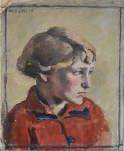 Portrait de jeune femme en rouge